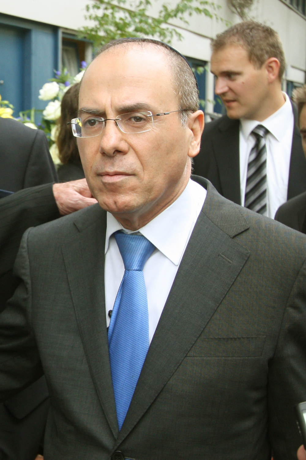 Silvan Schalom, israelischer Politiker. Zur Zeit (September 2012) Vize-Premierministers des Staates Israel. Hier bei einem Besuch am 05.09.2012 in München anläßlich der Gedenkfeier mit Kranzniederlegung im Olympischen Dorf.